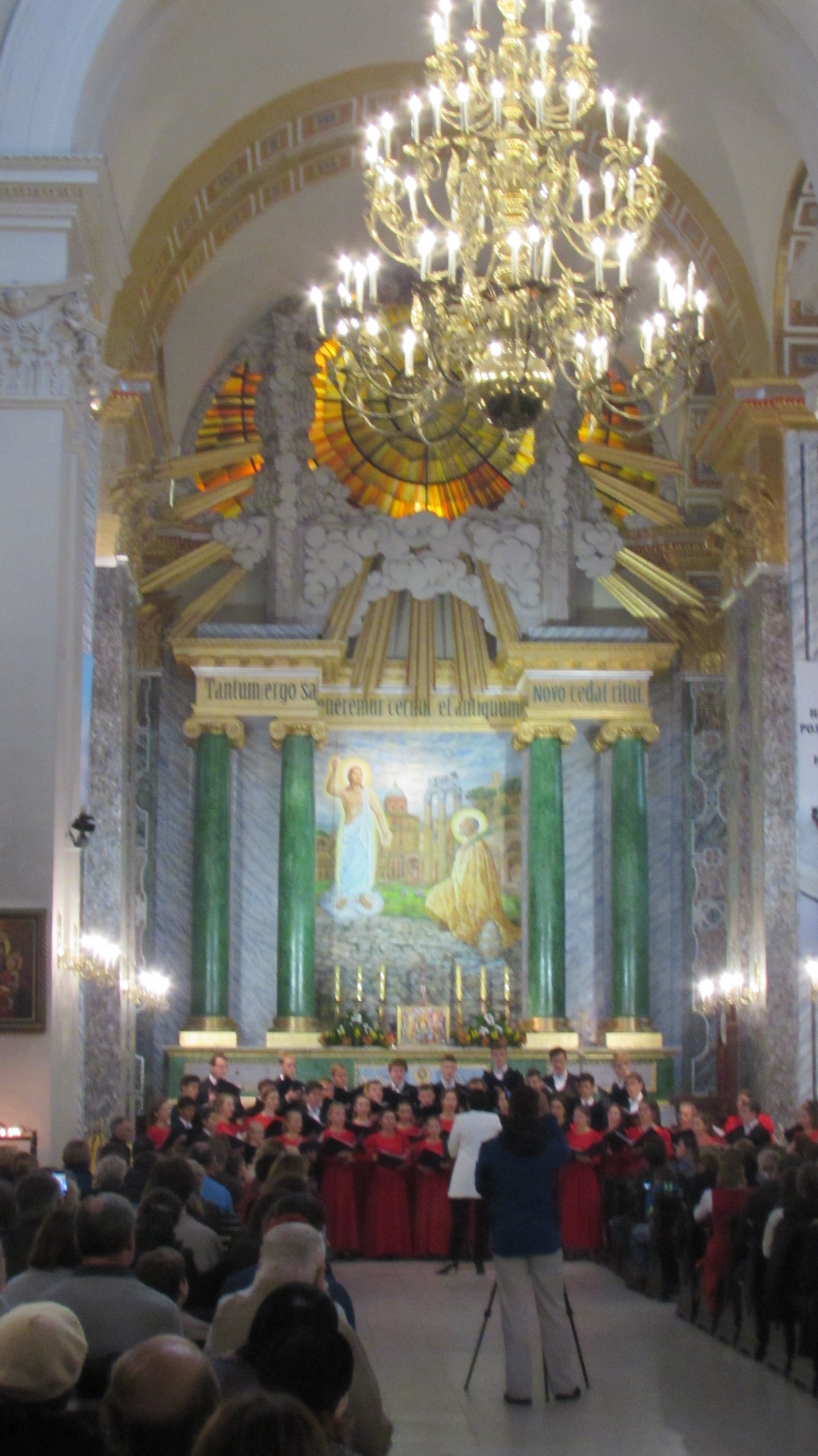 Kiew Alexander Kirche Innen 2017